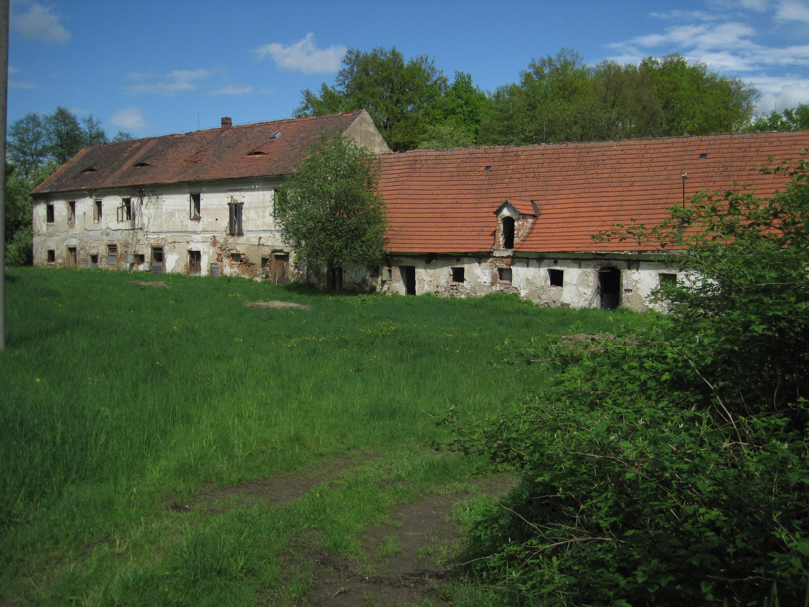 Tvrz, Uhřice 13, Uhřice (Sedlec-Prčice).